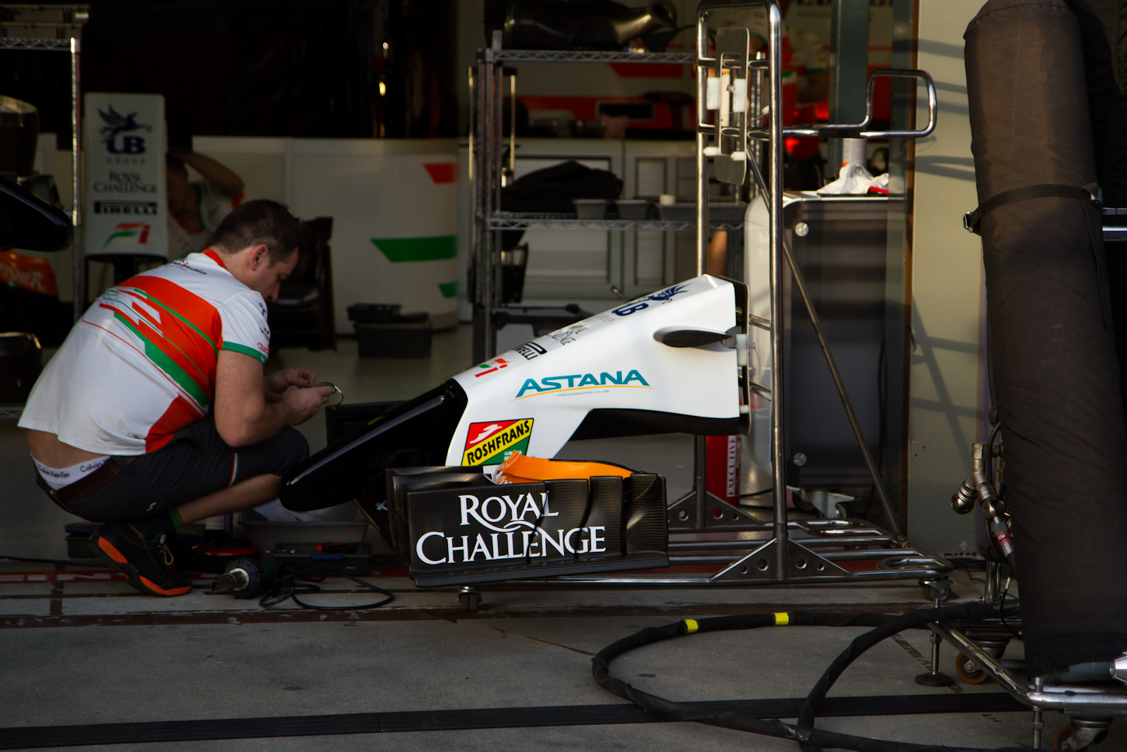 Force India VJM07 framvinge